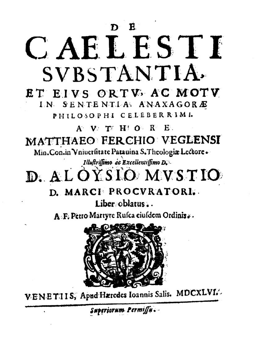 De caelesti substantia, et eius ortu, ac motu in sententia Anaxagorae philosophi celeberrimi. Authore Matthaeo Ferchio Veglensi .... - Venetiis : apud haeredes Ioannis Salis, 1646. - 458, [6] p. ; 4º .